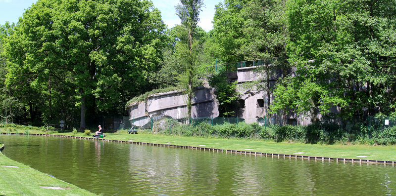 De Schans van Schilde maakte deel uit van de Stelling van Antwerpen. De schans kwam in actie op 5 oktober 1914 met onderhoudsvuur tegen de Duitsers. Beschieting en uitschakeling van de forten Walem en Sint-Katelijne-Waver leidde tot het verlies van de Vesting Antwerpen. Op 9 oktober werd de schans verlaten en opgeblazen door het terugtrekkende Belgische leger. Tussen de twee Wereldoorlogen werd een beperkt aantal aanpassingen doorgevoerd. Twee flankeringsbunkers werden geplaatst en twee abri conjugués, bewapend met mitrailleurs. De belangrijkste algemene maatregel was de aanleg van de anti-tankgracht.